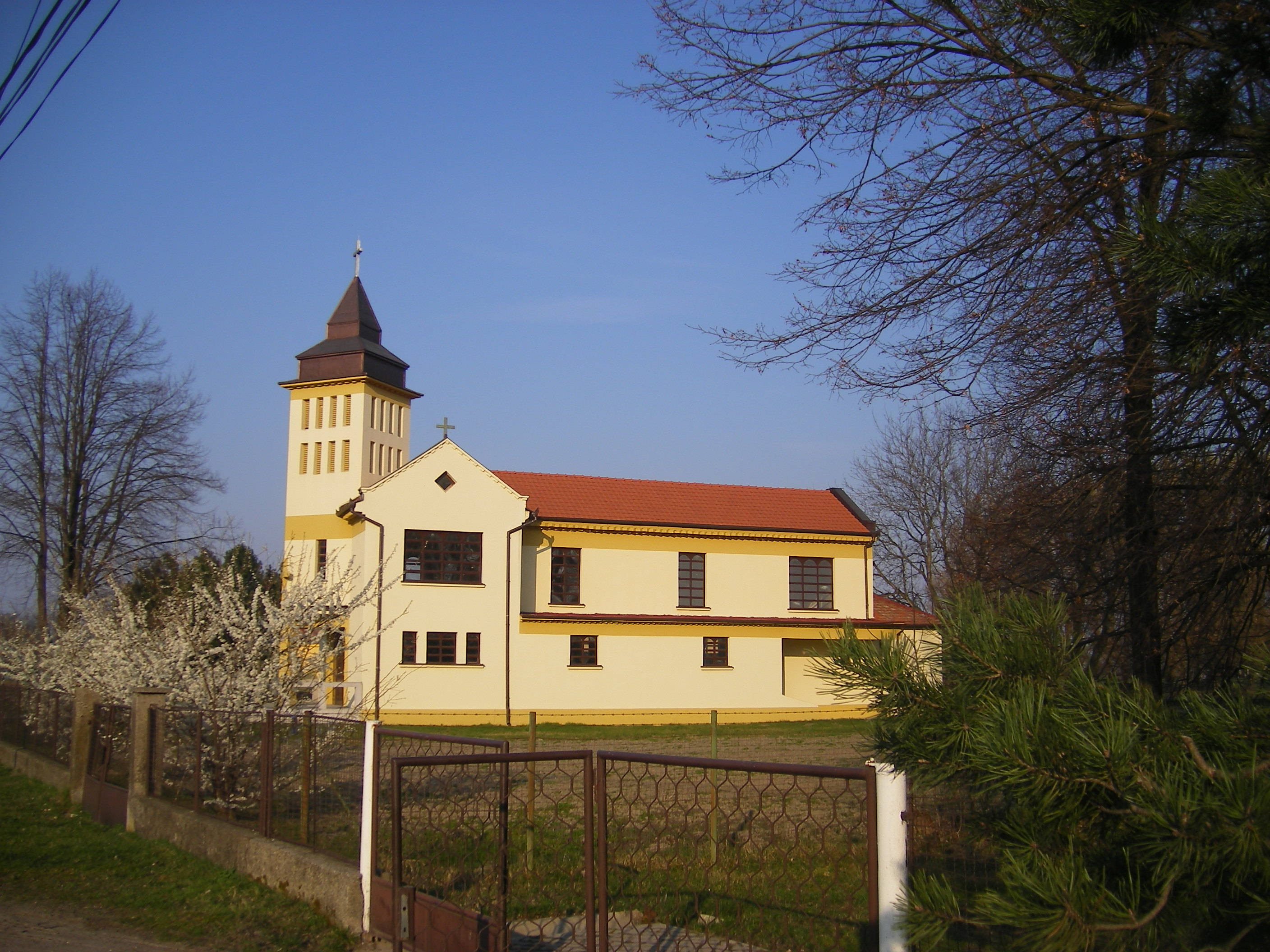 Zsemlékes katolikus temploma.